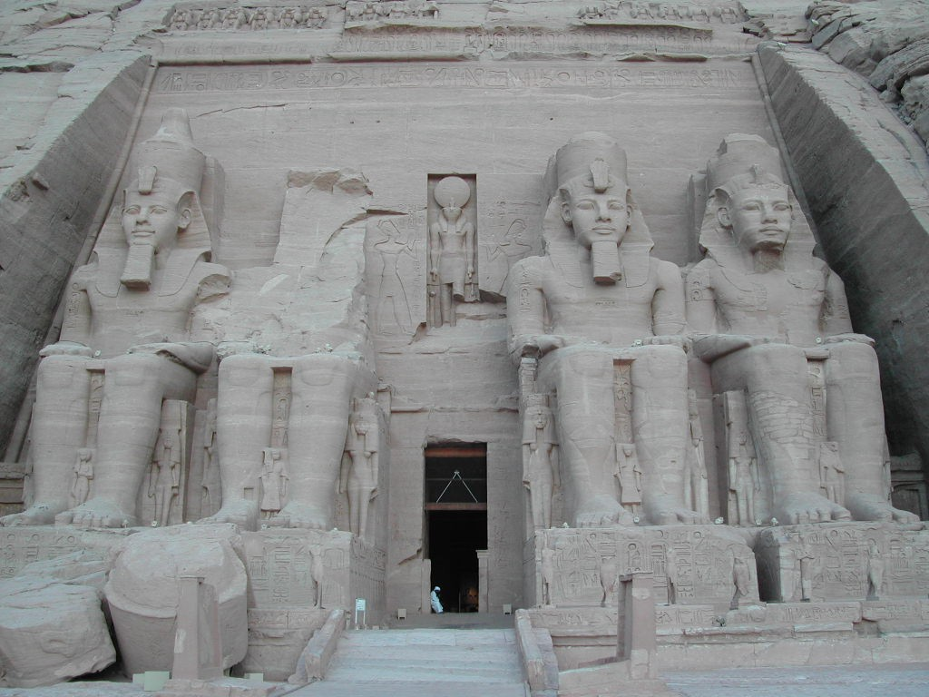 Egypten - Tempel vun Abu Simbel mat de véier Kolossalstatue vum Ramses II.